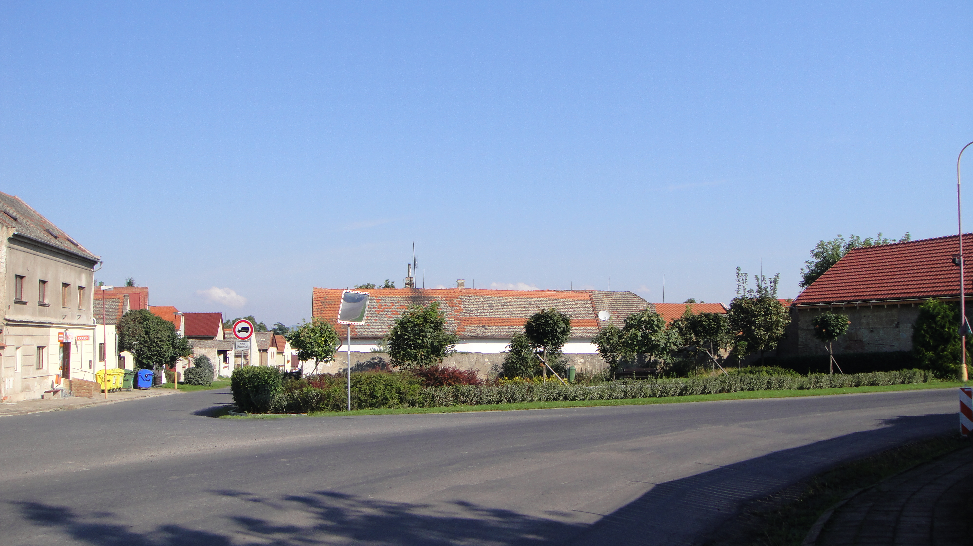 Nový parčík v Líšťanech.